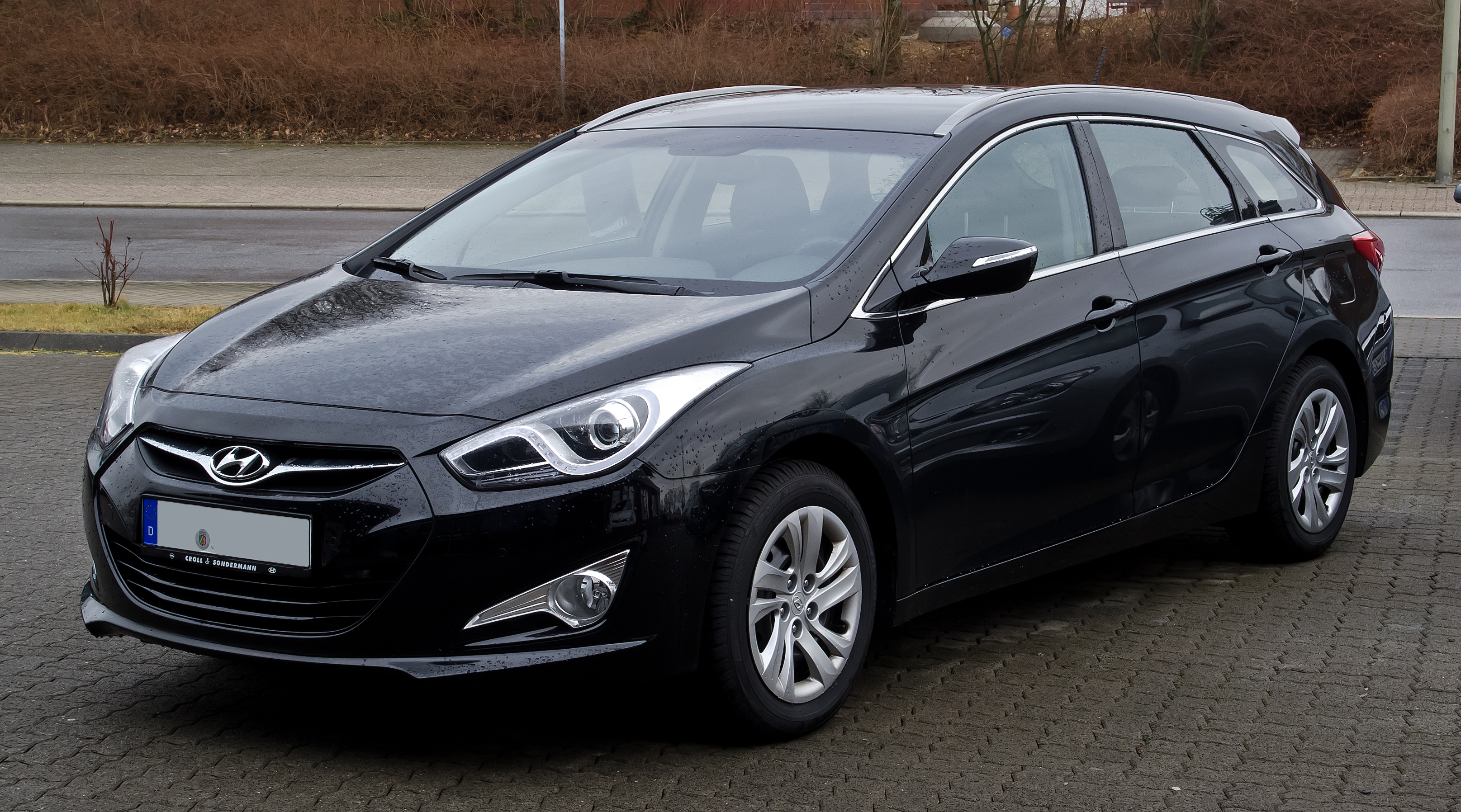 Hyundai i40cw 1.7 CRDi Style